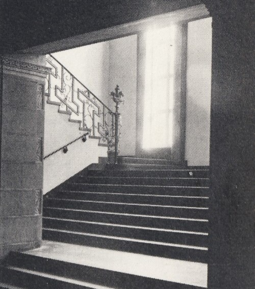 Konserthuset i Stockholm, trapphus